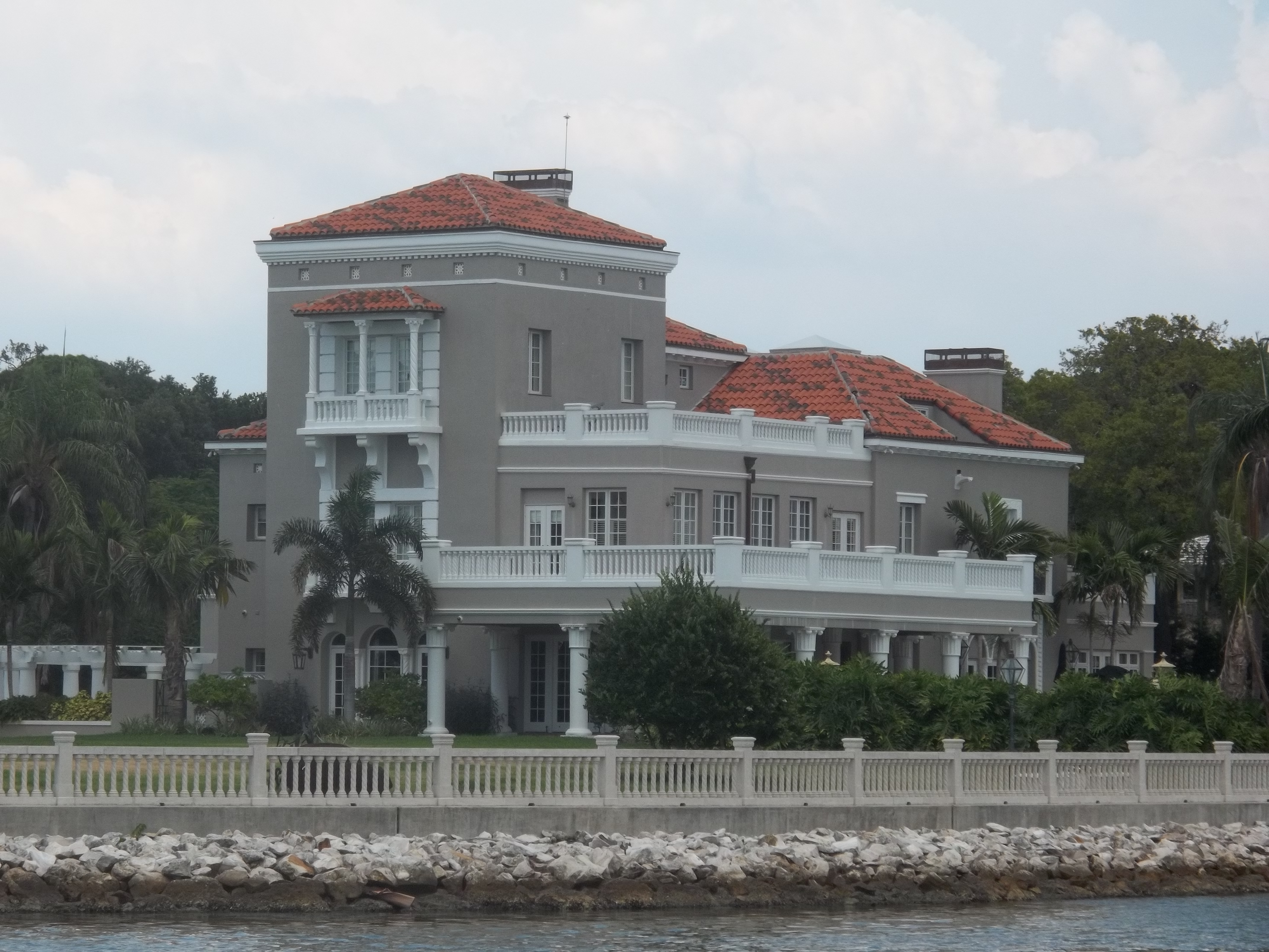 St. Petersburg, Florida: Snell Residence